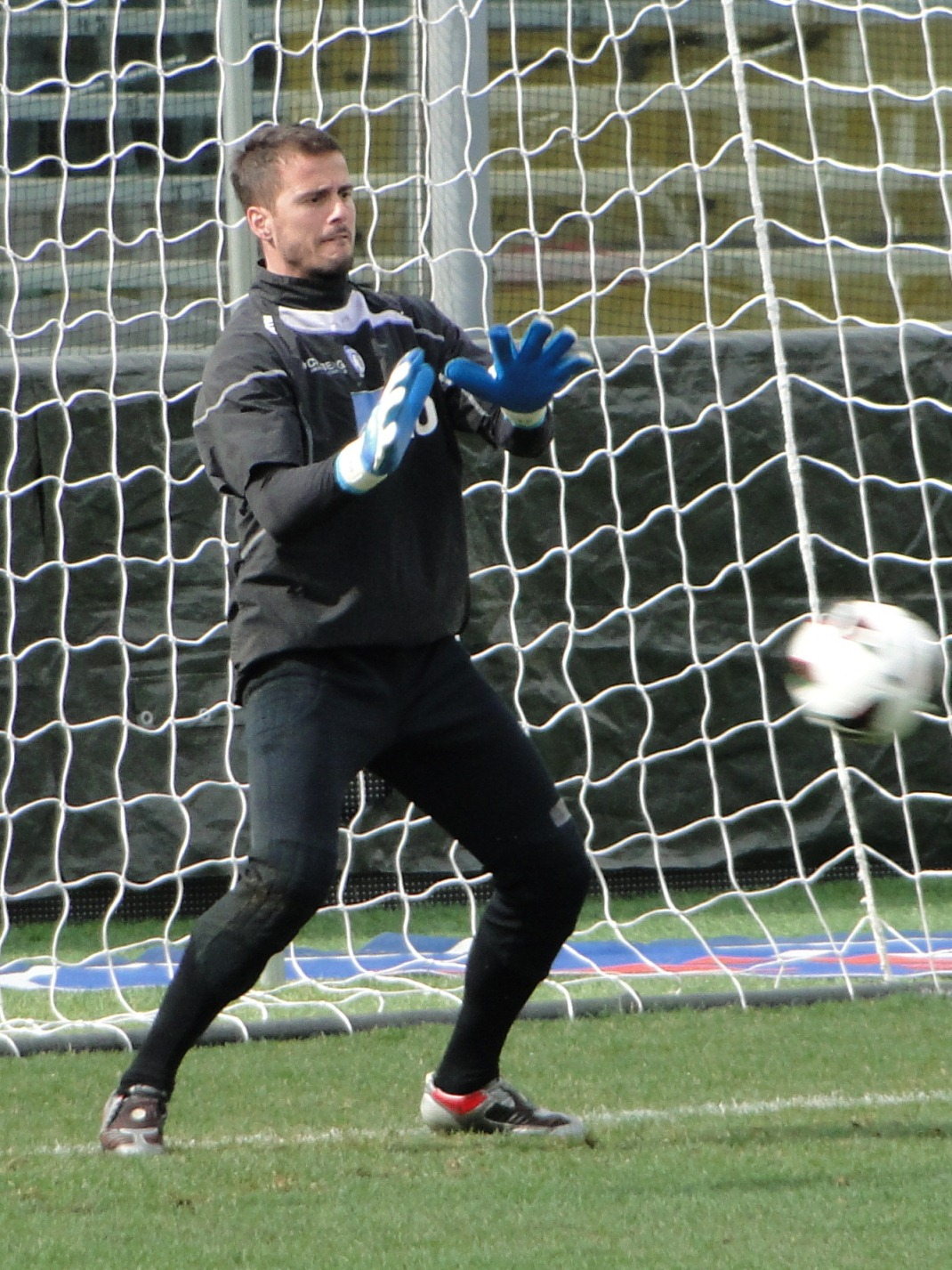 Ciro Polito, calciatore italiano